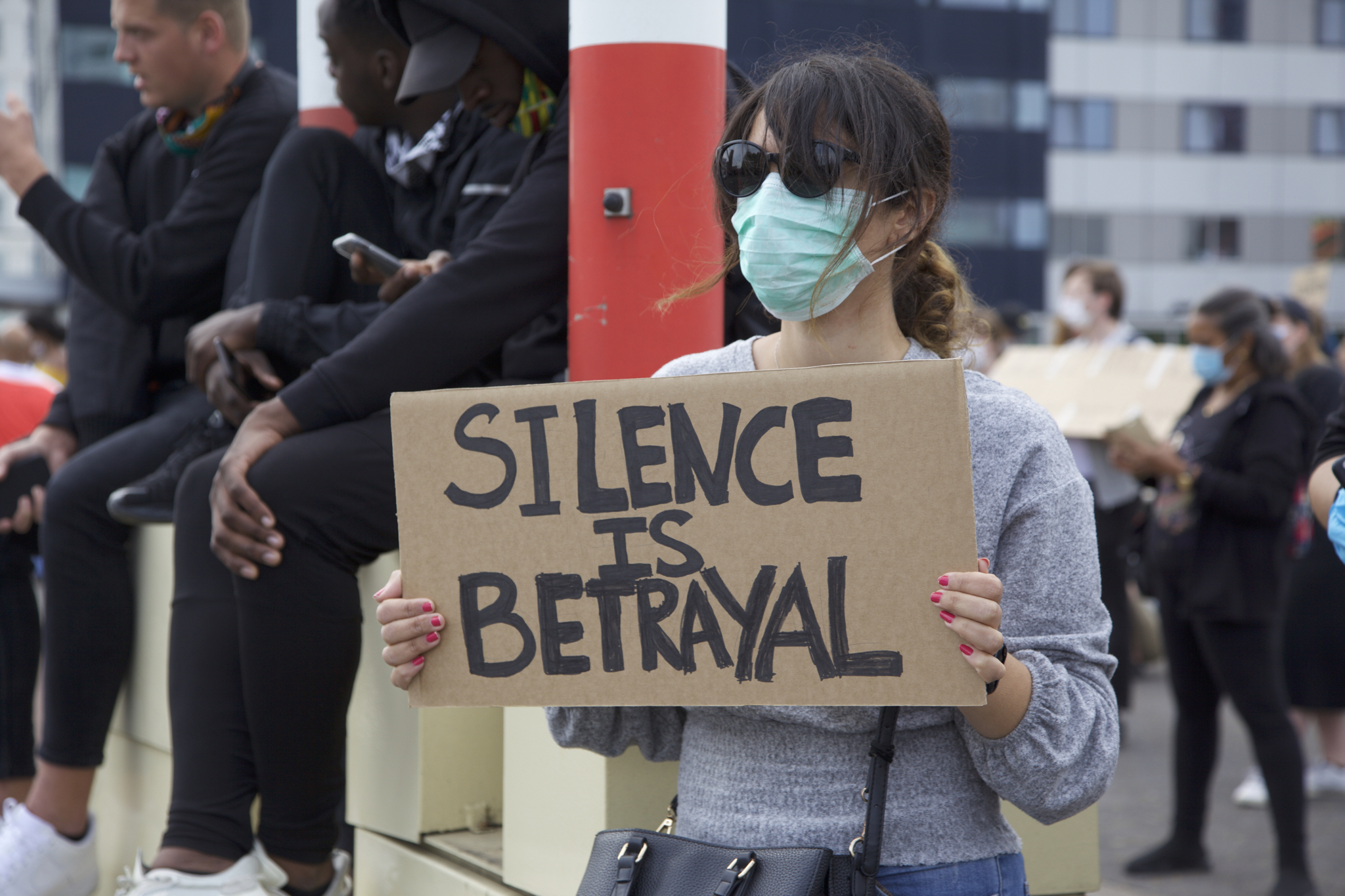 Black Lives Matter demonstratie, Rotterdam.